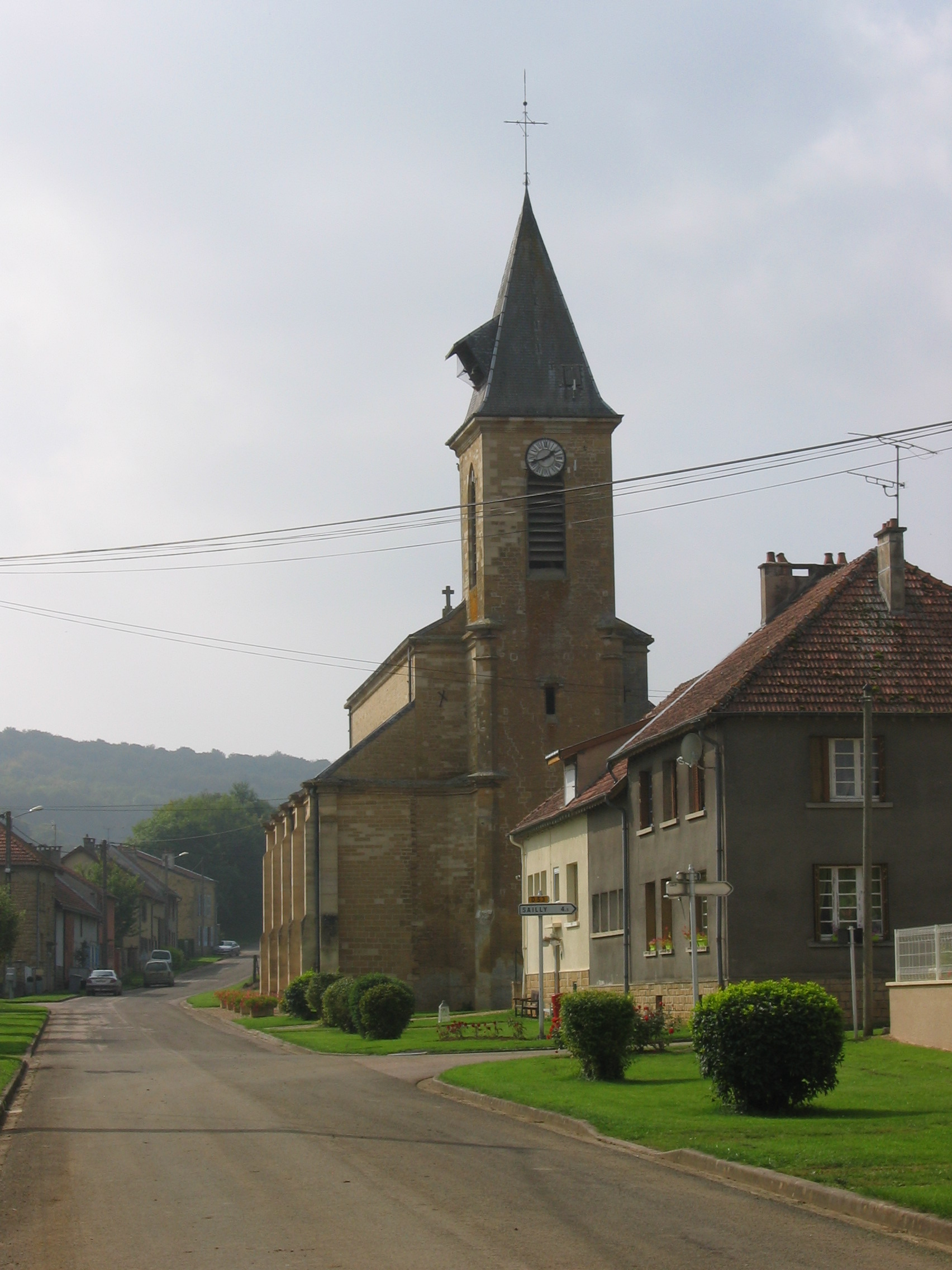 Vue de la rue principale de Malandry, Ardennes, France